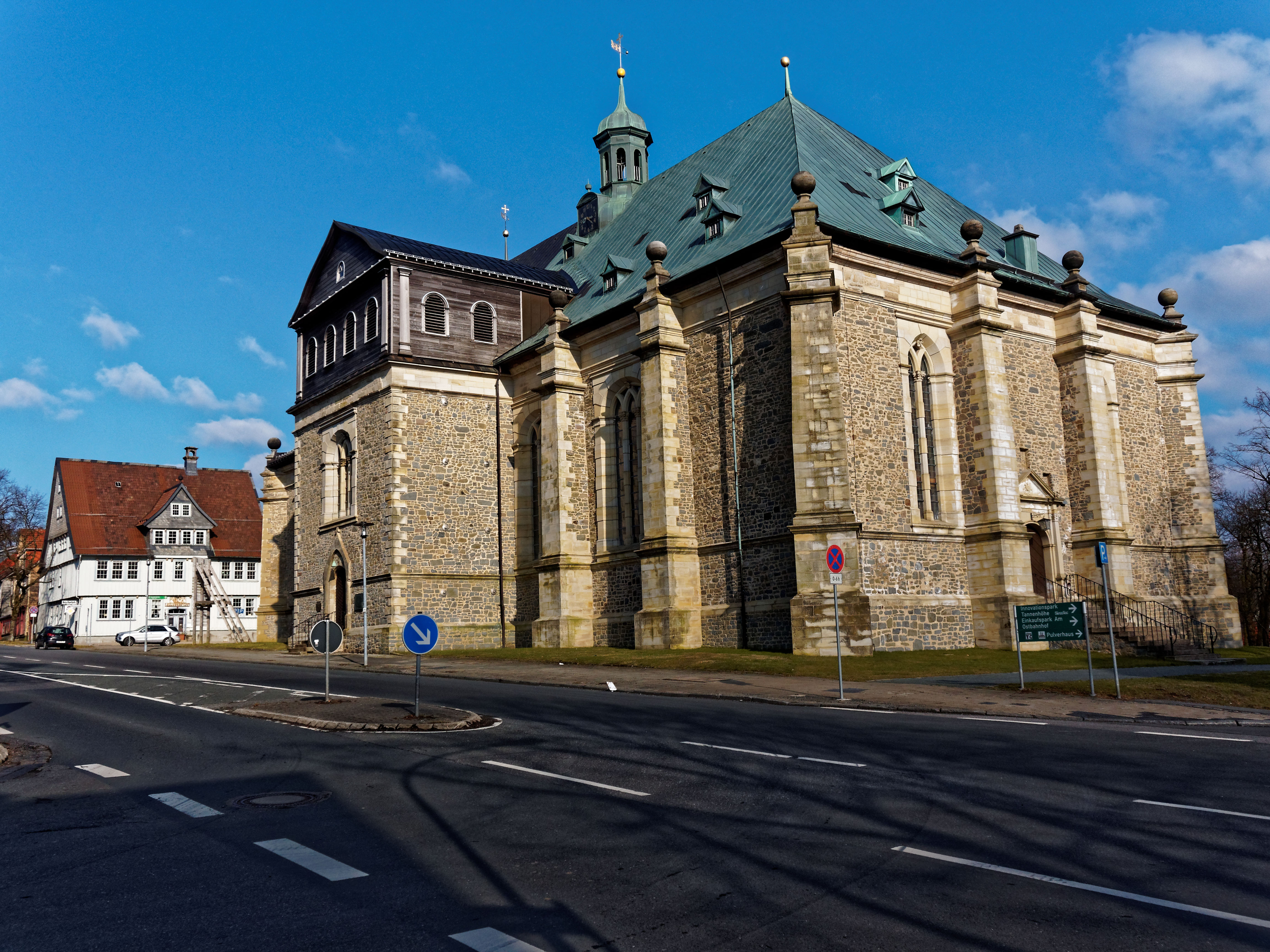 Blick von Südwesten auf die St.-Salvatoris-Kirche in Zellerfeld. Im Hintergrund links die historische Bergapotheke von Zellerfeld.